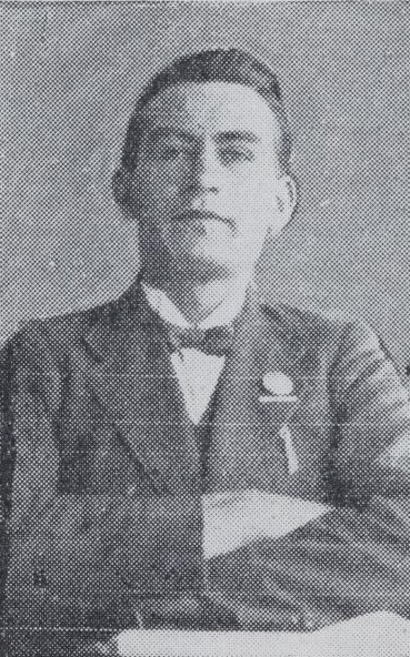 A. R. G. Hawke